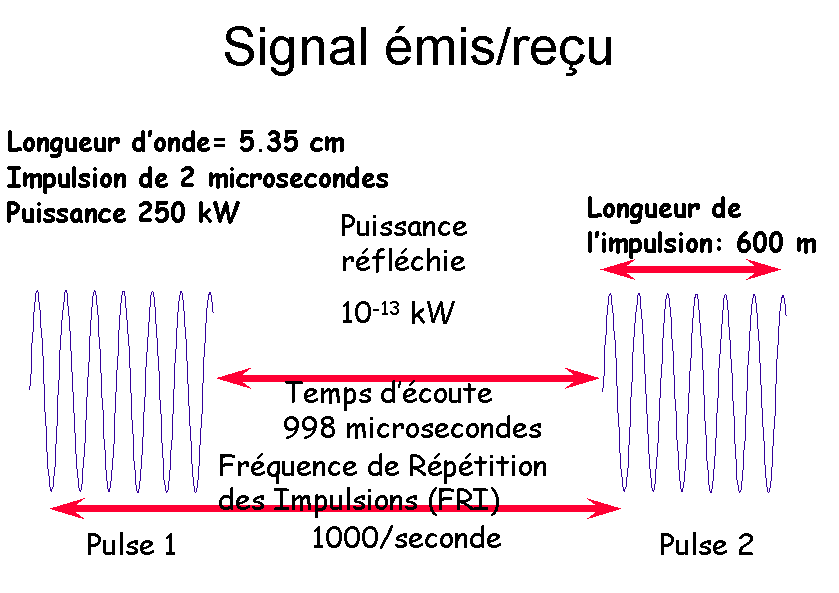 Schémas de fonctionnement du radar à impulsions avec une longueur d'onde de 5,35 cm caractéristique de plusieurs radar météorologiques. Licensing Catégorie:Schéma de physique Catégorie:Radar